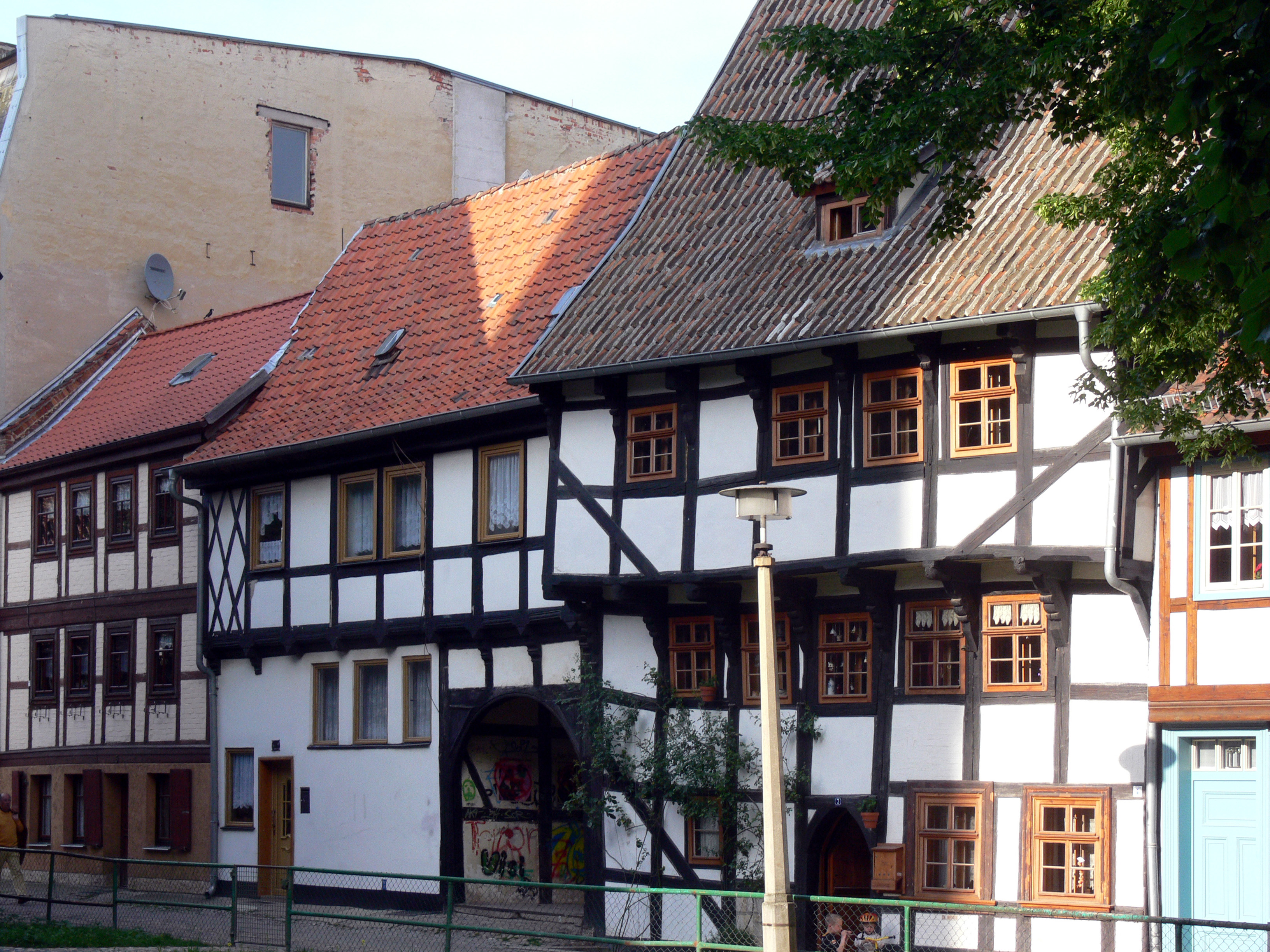 Häuser hinter der Nikolaikirche in Quedlinburg. Kirchhof 7.